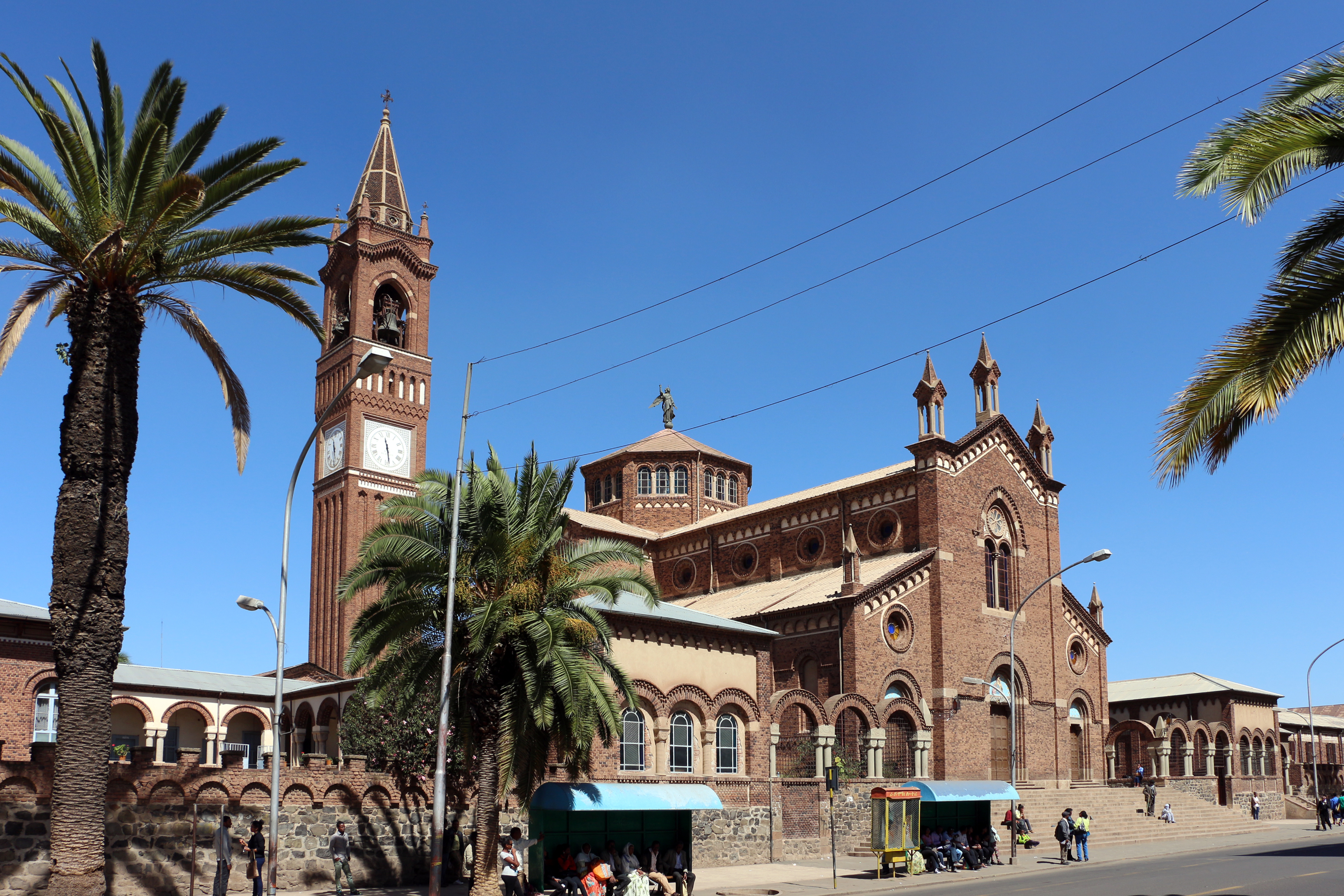 Asmara, cattedrale cattolica, 01.JPG